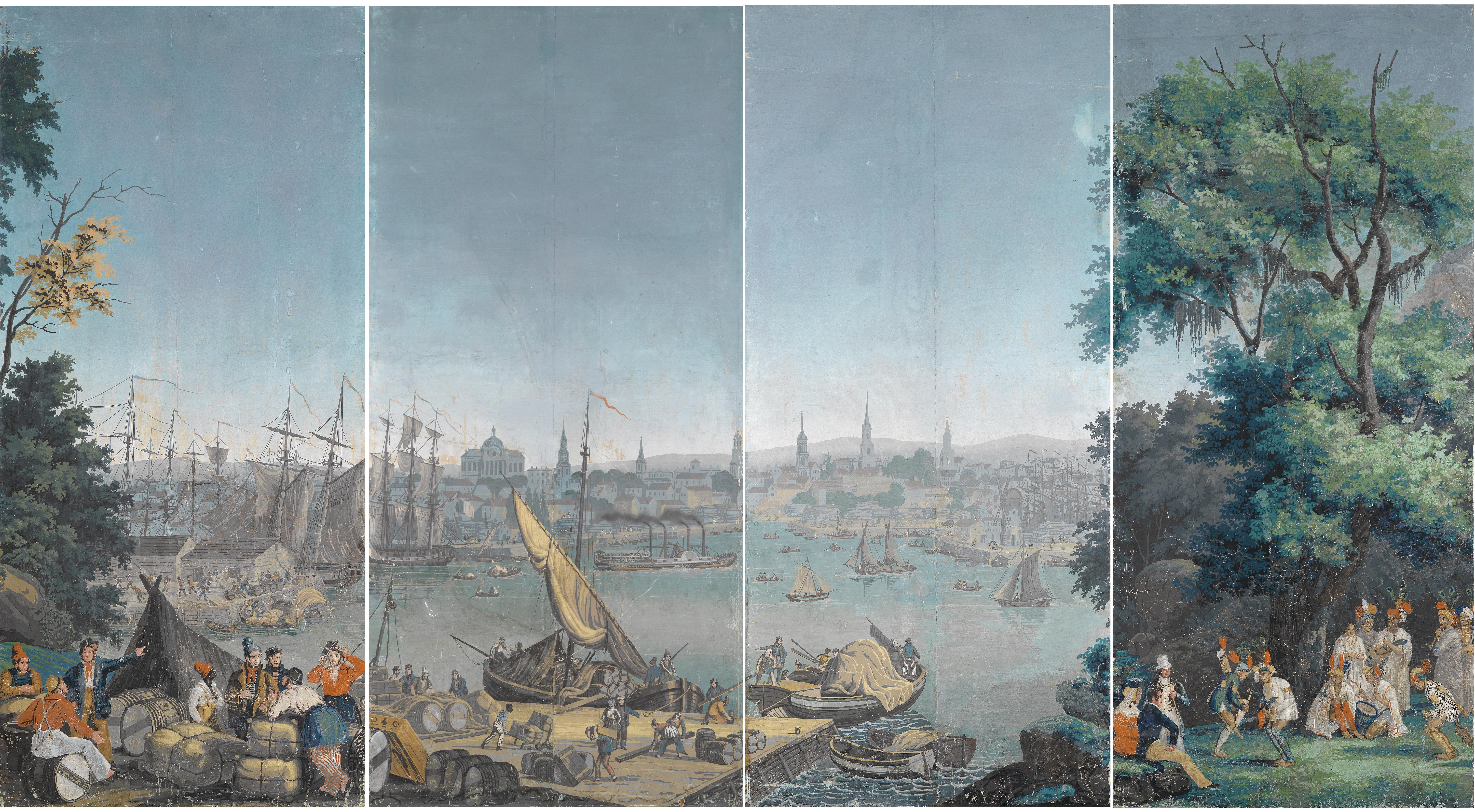 Panorama-Tapete „Hafenszene in Boston“, 1834 (Entwurf); 4 Bahnen, je 199 x 91 cm bzw. 93 cm, oben umgebogen (ca. 20 cm), Manufaktur Zuber & Cie. (Rixheim, Frankreich)